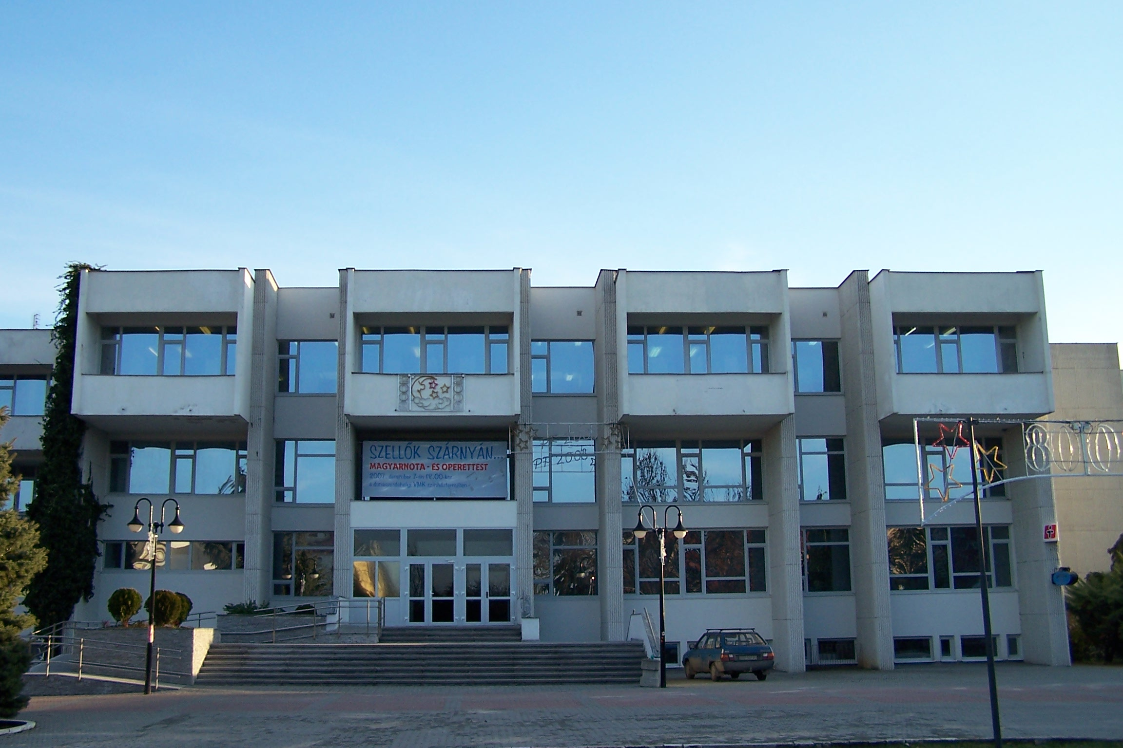 Mks_v_DS_celkový-pohľad_z_námestia